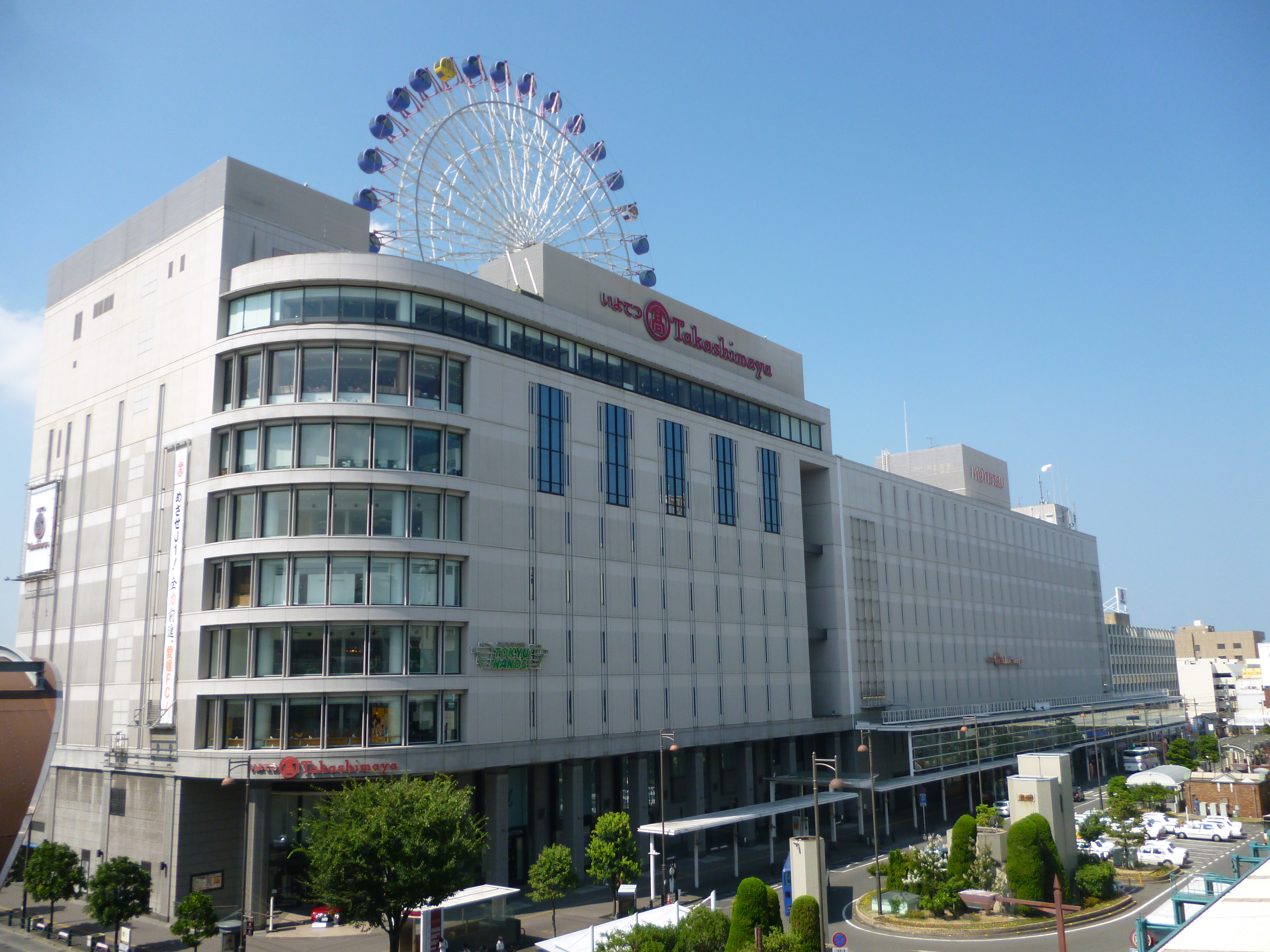 松山市駅ターミナル